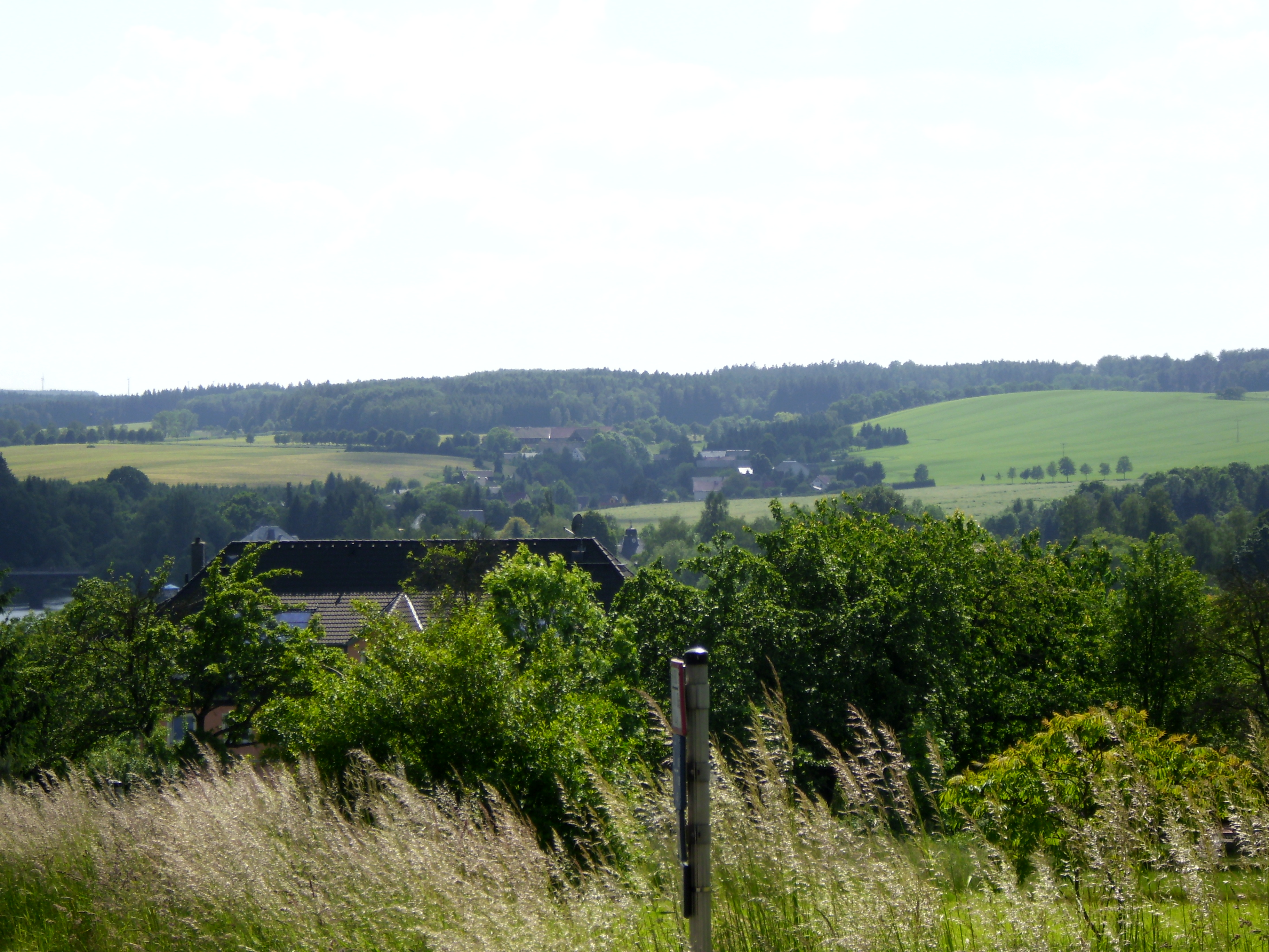 Blick auf Paulsdorf vom Weg zur Dippoldiswalder Heide in Malter mit den ehemaligen Kurhaus von Malter im Vordergrund.